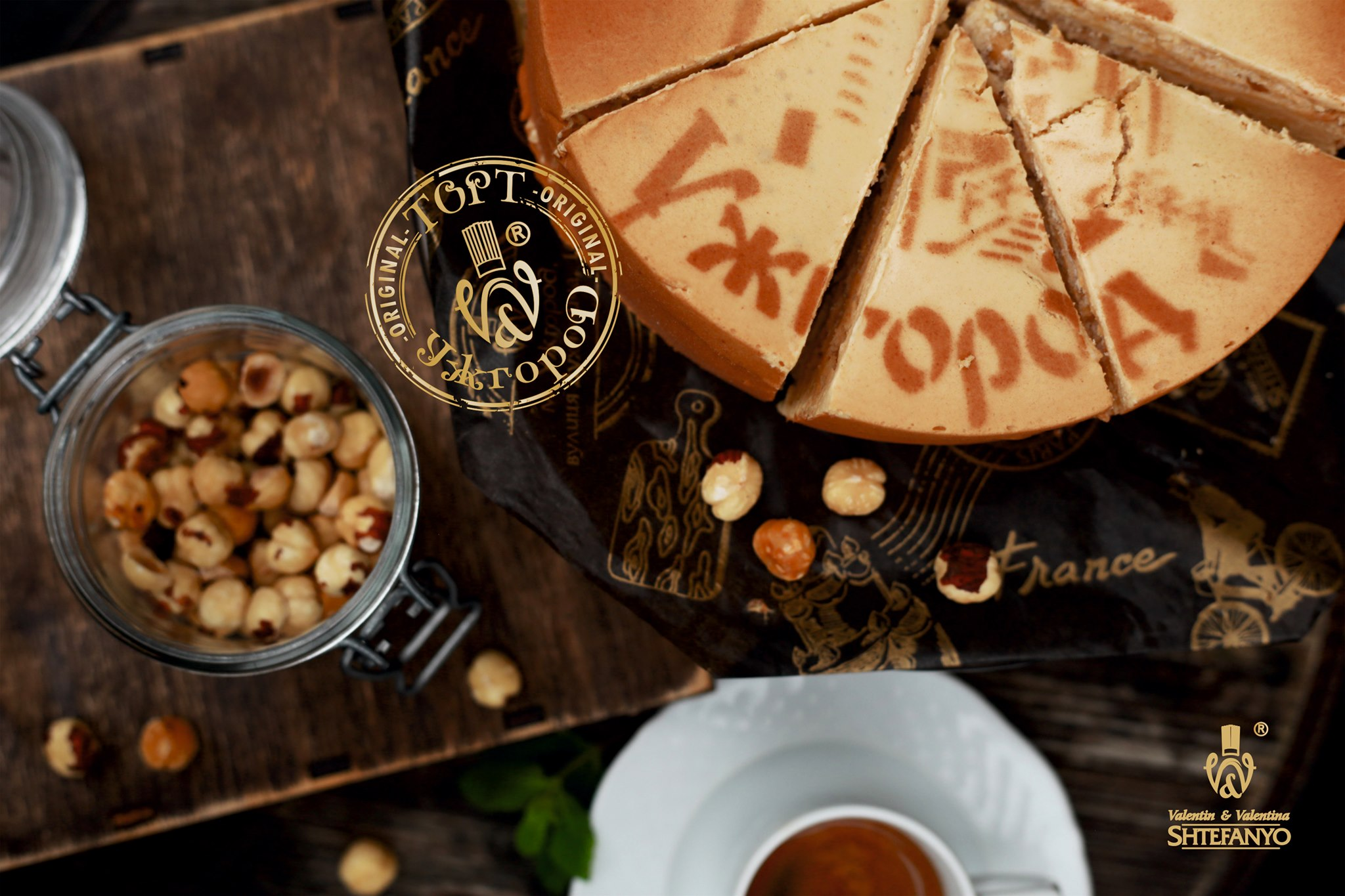 Торт "Ужгород"